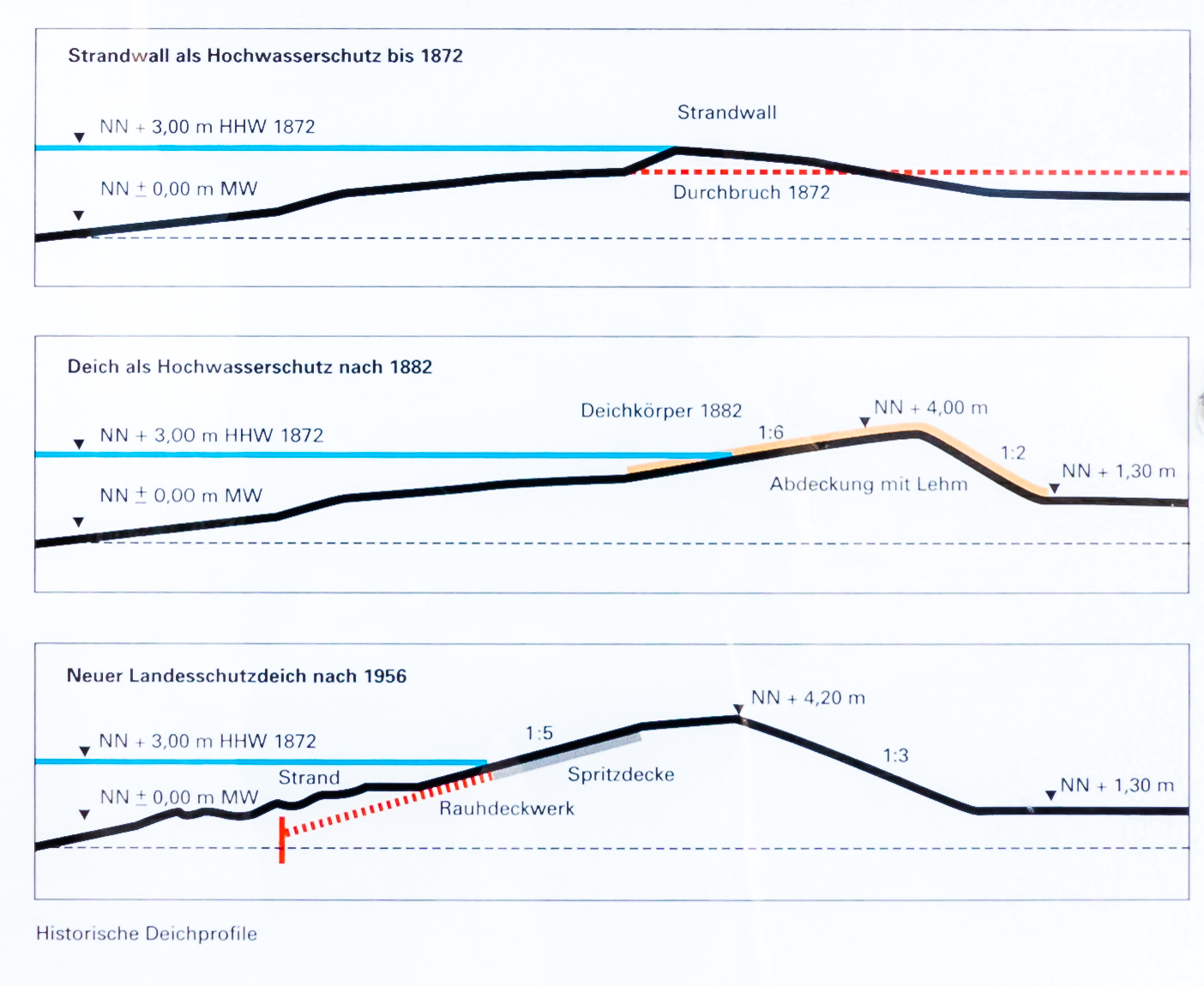 Schönberger Strand – Infopavillion Küstenschutz in Schleswig-Holstein